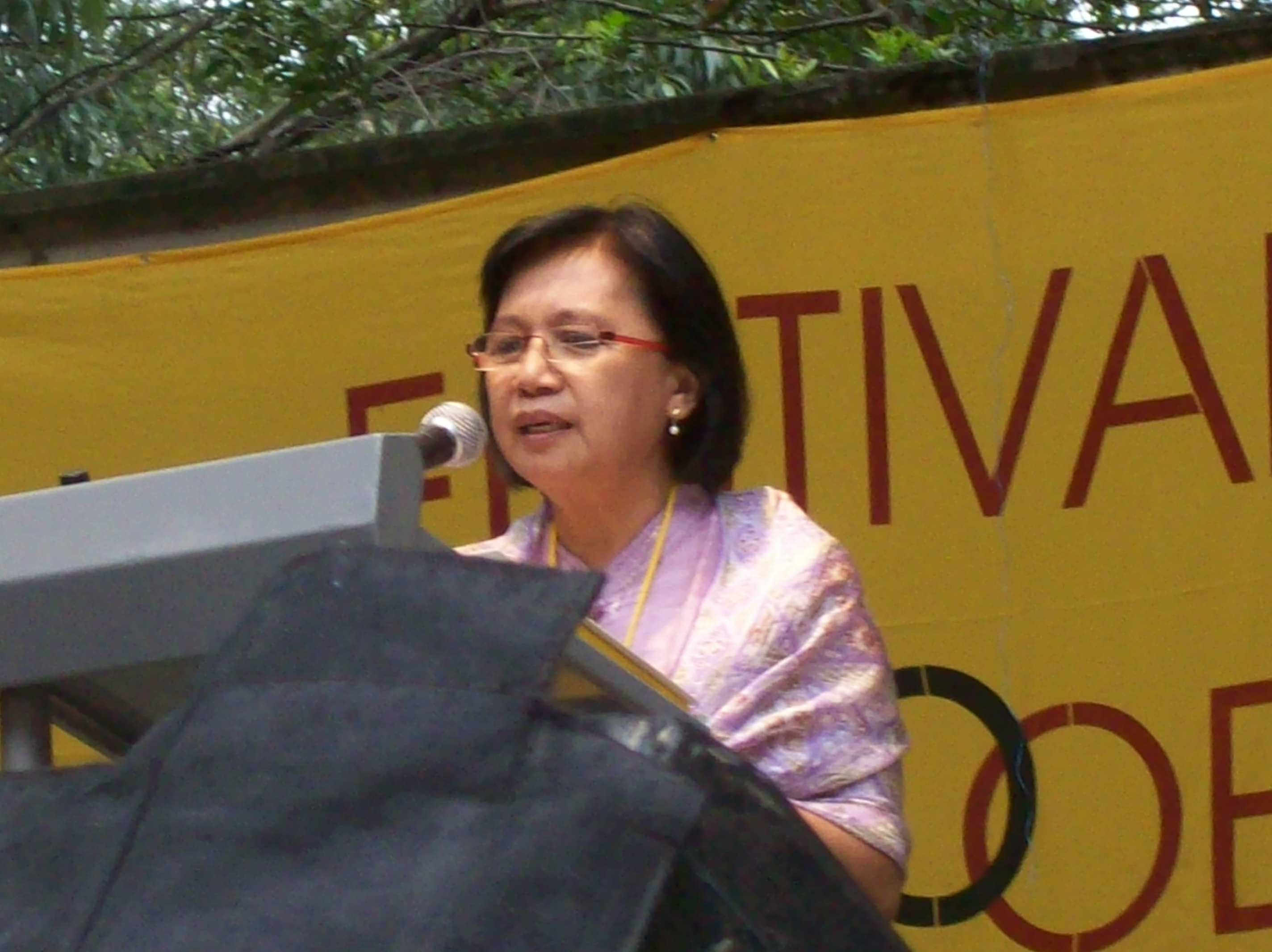 Marjorie Evasco, poetisa filipense, en la inauguración del XVIII Festival Internacional de Poesía de Medellín